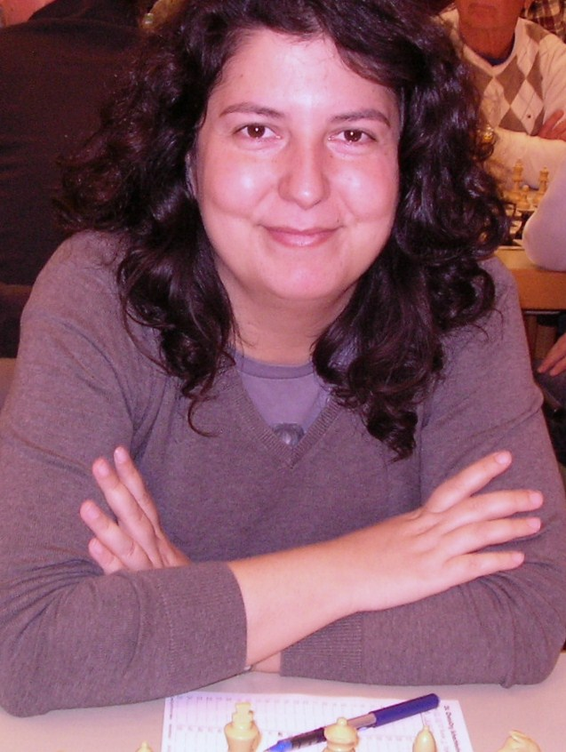 Monica Calzetta, Bad Wörishofen 2012.